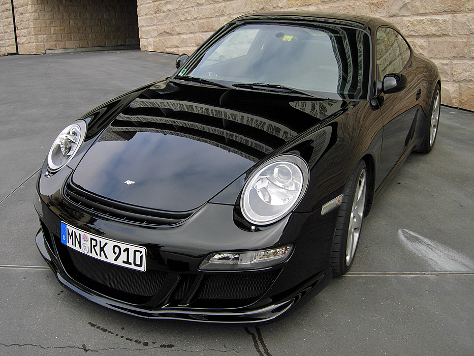 Der "eRuf" der Automobilfirma Ruf